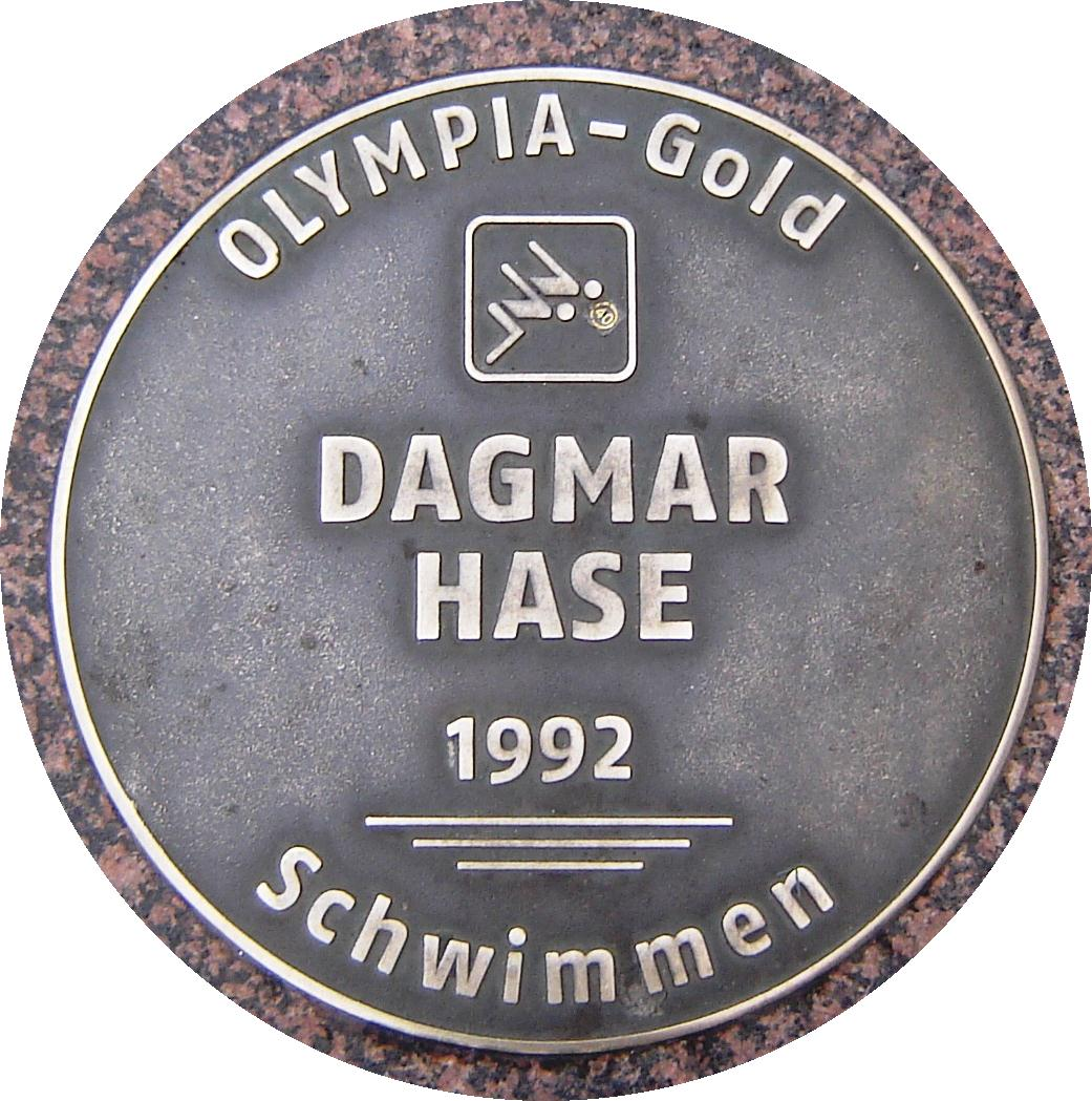 Sports-Walk-of-Fame-Plakette für Dagmar Hase auf dem Breiten Weg in Magdeburg